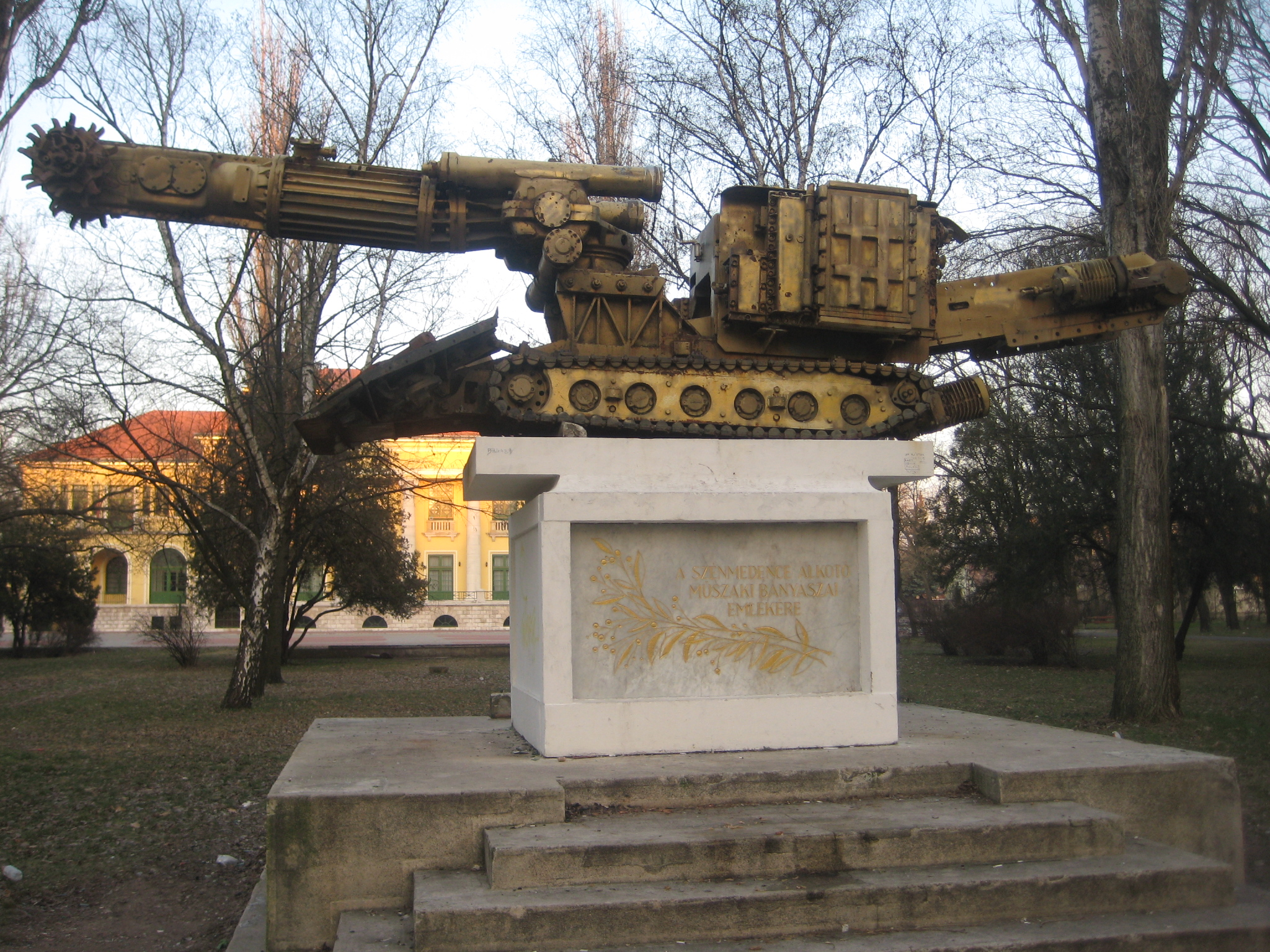 F6 vágathajtó gép, a dorogi Otthon téren,háttérben a József Attila Művelődési Házzal.